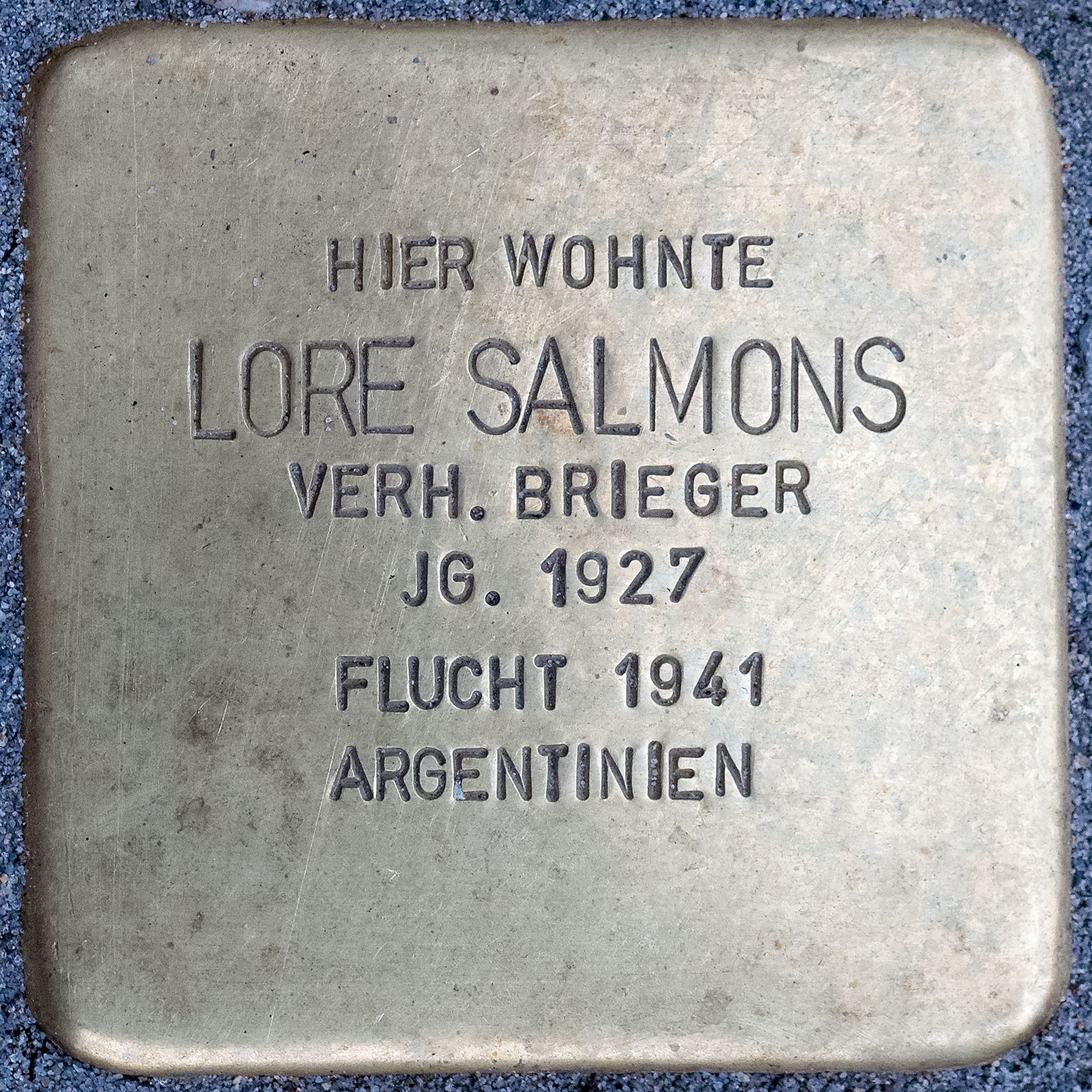 Stolpersteine Willich: Salmons, Lore